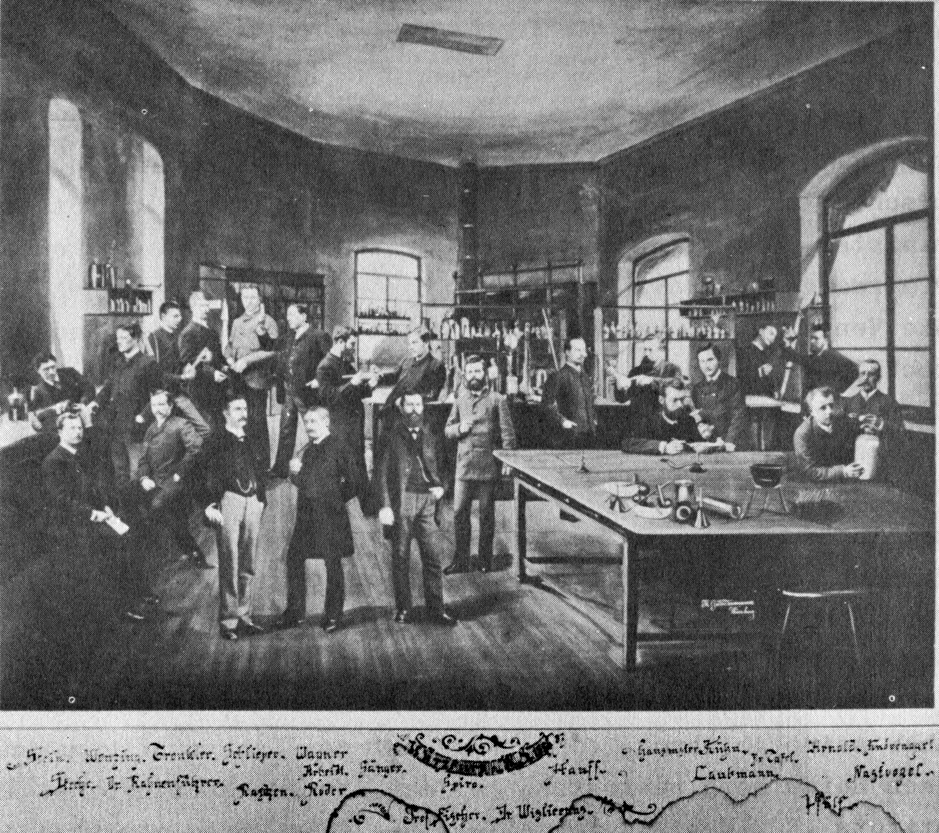 Uni Würzburg - Emil Fischer, Doktoranten und Studenten im alten Institut Maxstraße (1885-1892) Prof. Emil Fischer (* 9. Oktober 1852 in Euskirchen; † 15. Juli 1919 in Berlin) Dr. Julius Tafel (* 2. Juni 1862 in Choindez (Gemeinde Courrendlin/CH); † 2. September 1918 in München), Assistent 1885-1889 Dr. Wilhelm Wislicenus (* 23. Januar 1861 in Zürich, † 8. Juni 1922 in Tübingen), promoviert 1885, Priv.doz. 1888-1890 Dr. Carl Rahnenführer (* 1859; † 1921), Assistent 1885-1888 Oskar Knoevenagel (* 1862; † 1944), promoviert in 1887 - ein Cousin von Emil Knoevenagel Max Wenzing (* ca.1863; † ??), promoviert in 1887, from Austria Oscar Nastvogel (* 1863; † 1910), promoviert in 1887 Philipp Wagner (* 1863; † ??), promoviert in 1887 Adolf Schlieper jun. (* 1865; † 1945), promoviert in 1887 Bruno Trenkler (* ca.1863; † ??), promoviert in 1887 Albert Steche (* 1862; † ??), promoviert in 1887 Heinrich Laubmann (* 1865; † 1951), promoviert in 1888 Friedrich Hauff (* 1863; † 1935), promoviert in 1888 Karl Spiro (* 1867; † 1932), promoviert in 1889